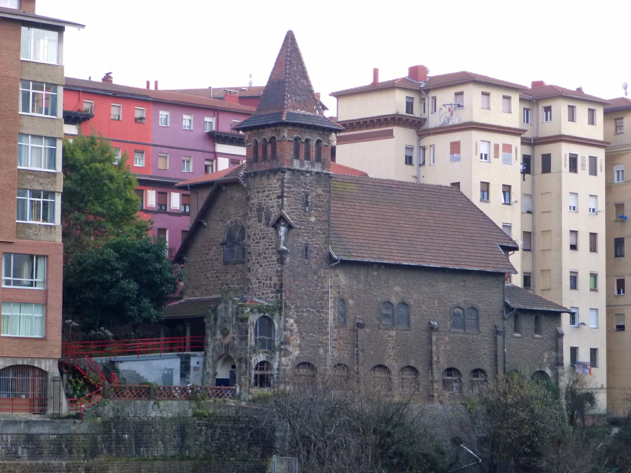 Parroquia de San Rafael Arcángel (Bilbao)